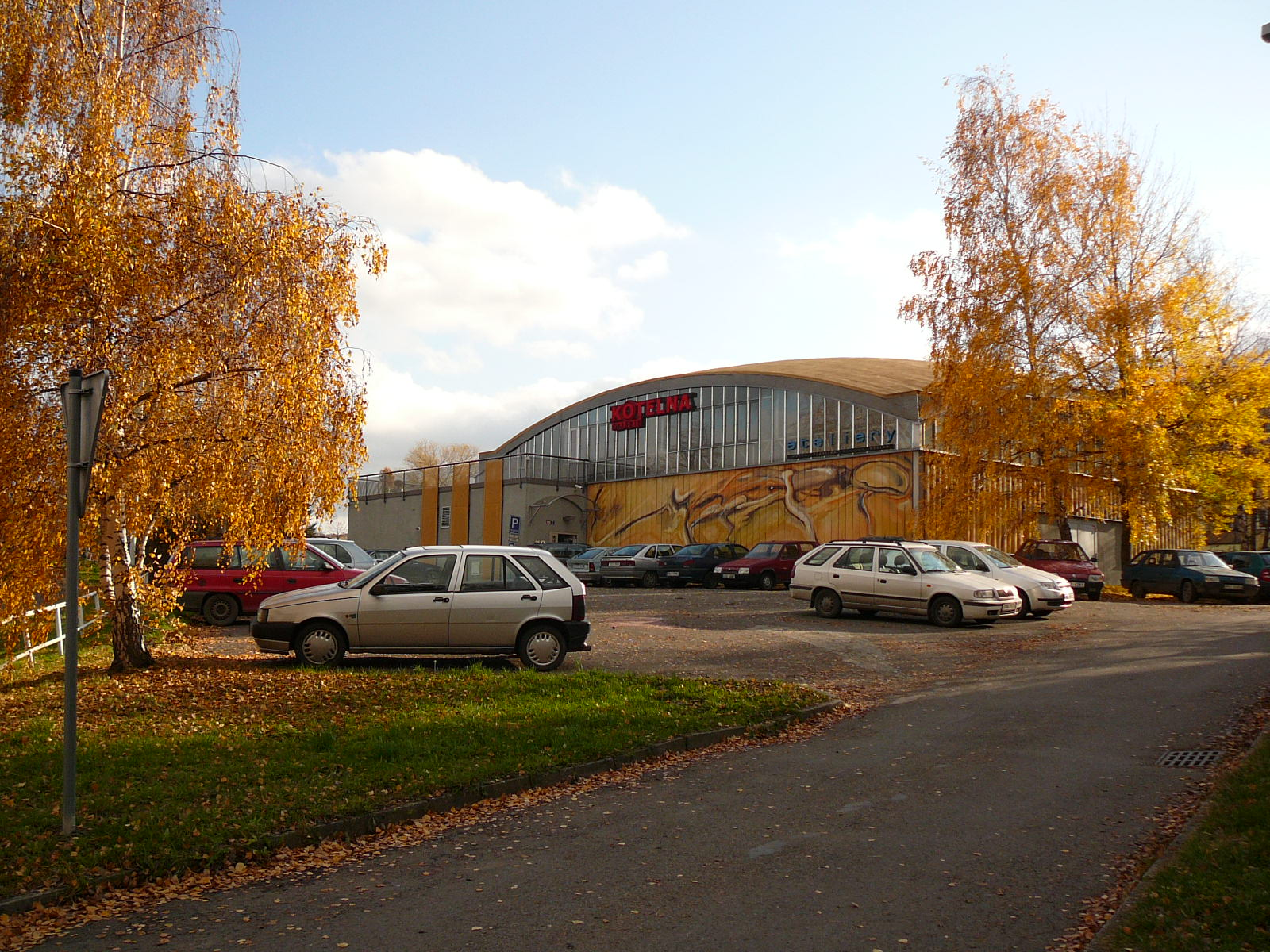 Exteriér galerie